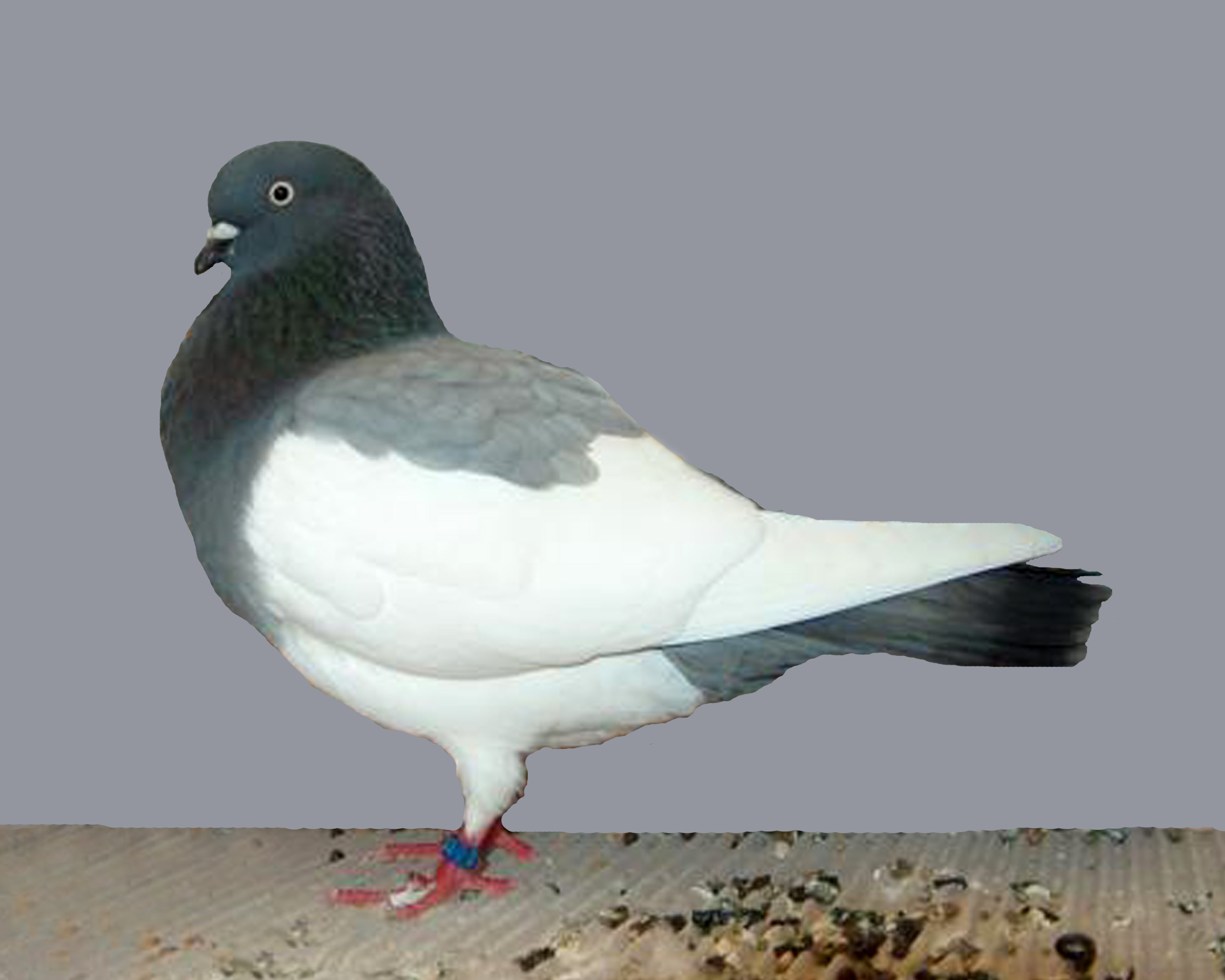 Old German Magpie Tumbler (Blue)